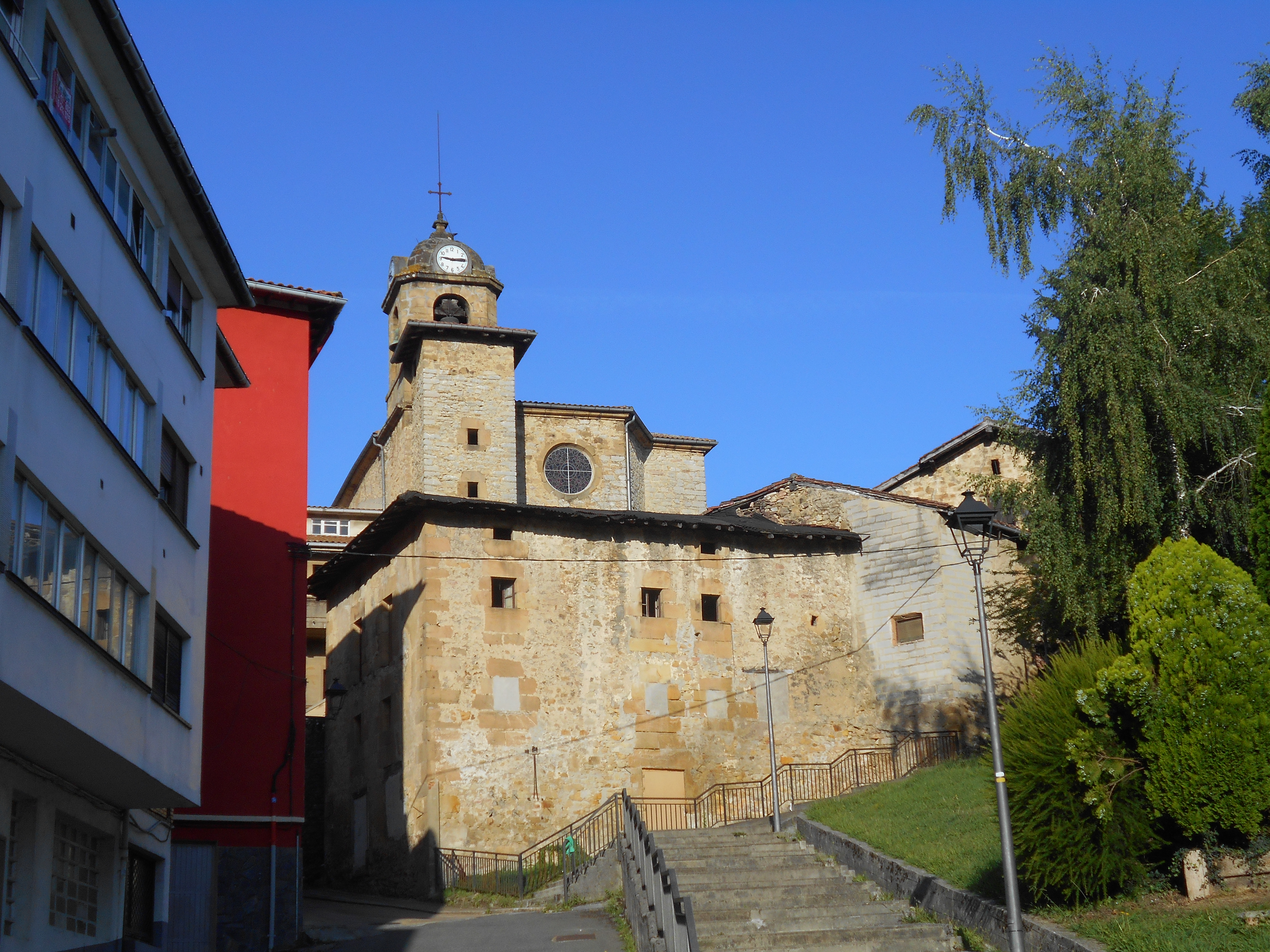 Iglesia de San Andrés de Zaldibar